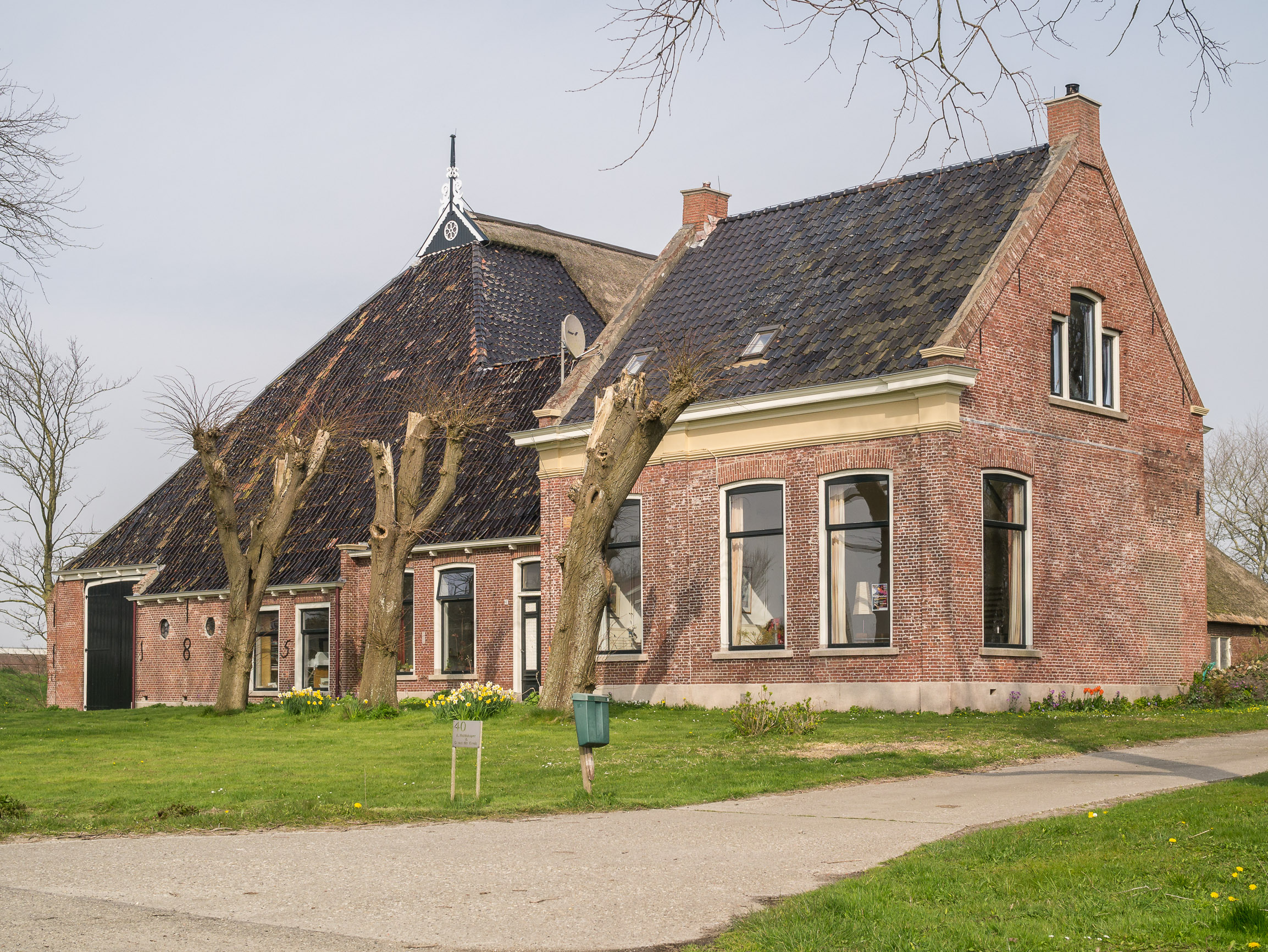 De Plaets, Koudeweg 40, Sint Jacobiparochie